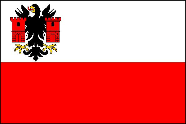 Vlajka obce Lubenec